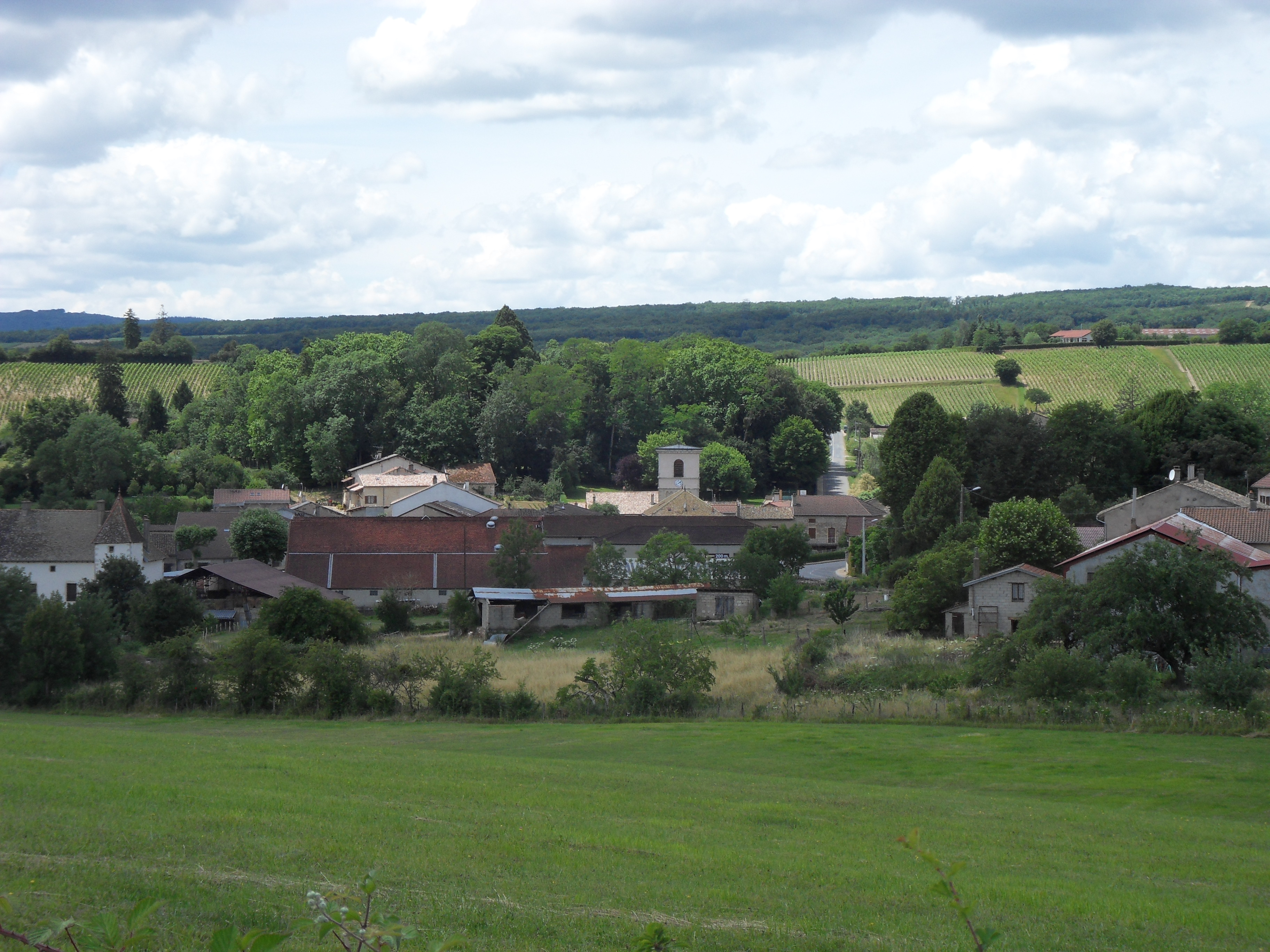 Plan large de Chardonnay, Saône-et-Loire